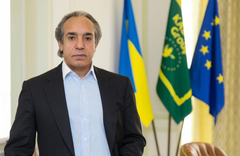 صورة شخصية عدنان كيوان